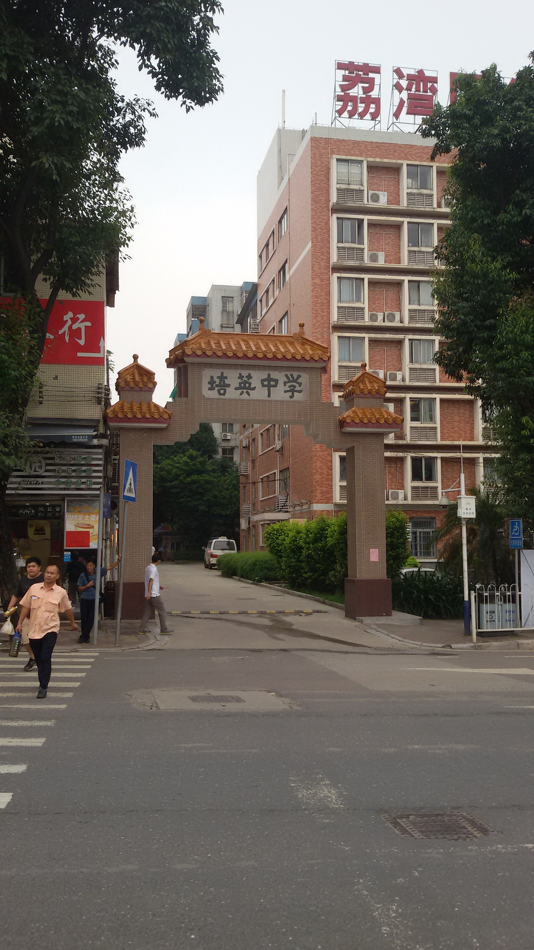 粵語: 廣州市培英中學（白鶴洞校區）嘅牌坊